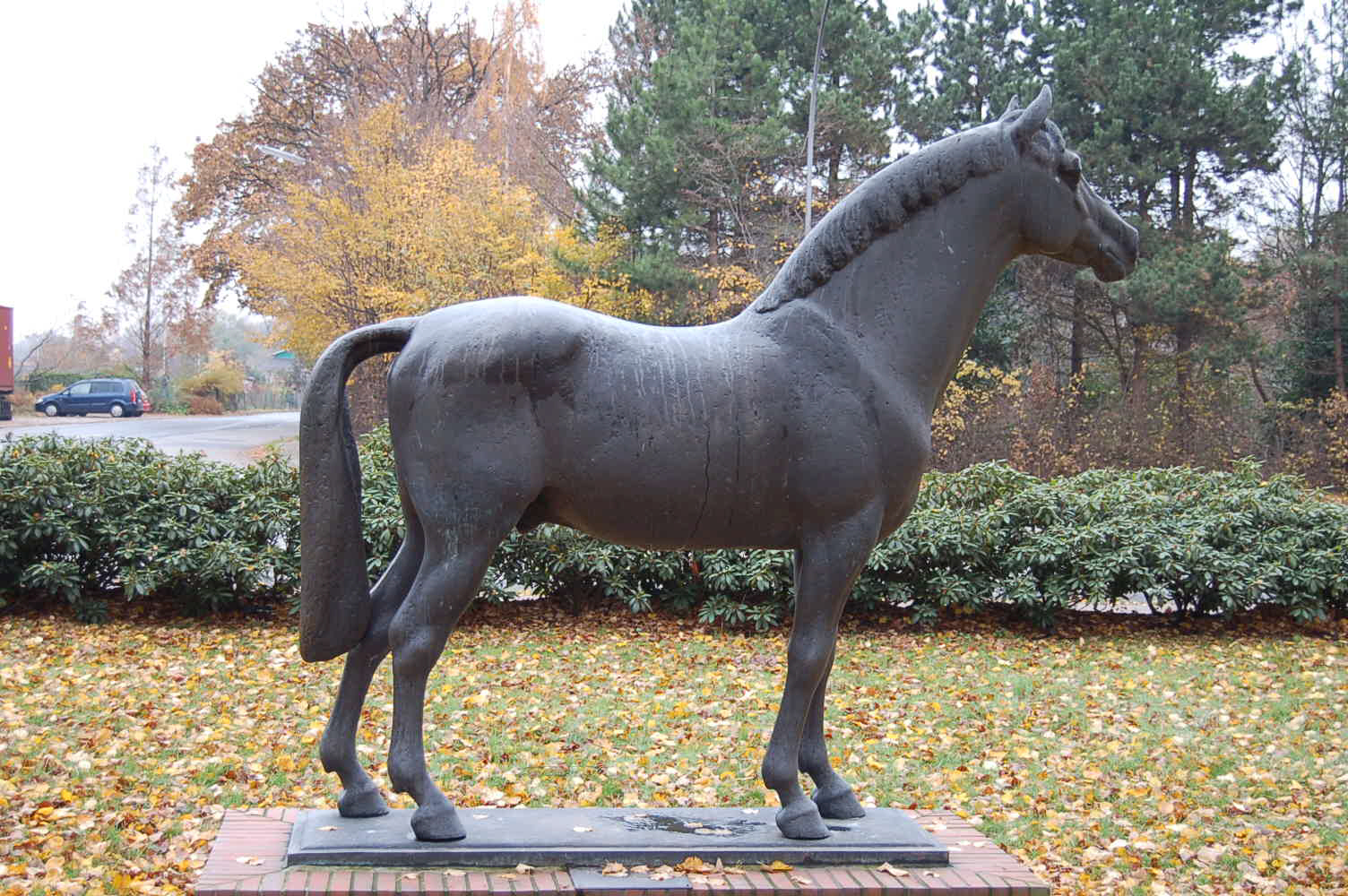 Holsteinerhengst Landgraf, lebensgroße Bronze-Statue 1994 in Elmshorn, die anlässlich der 100-Jahr-Feier der Reit- und Fahrschule Elmshorn enthüllt wurde.